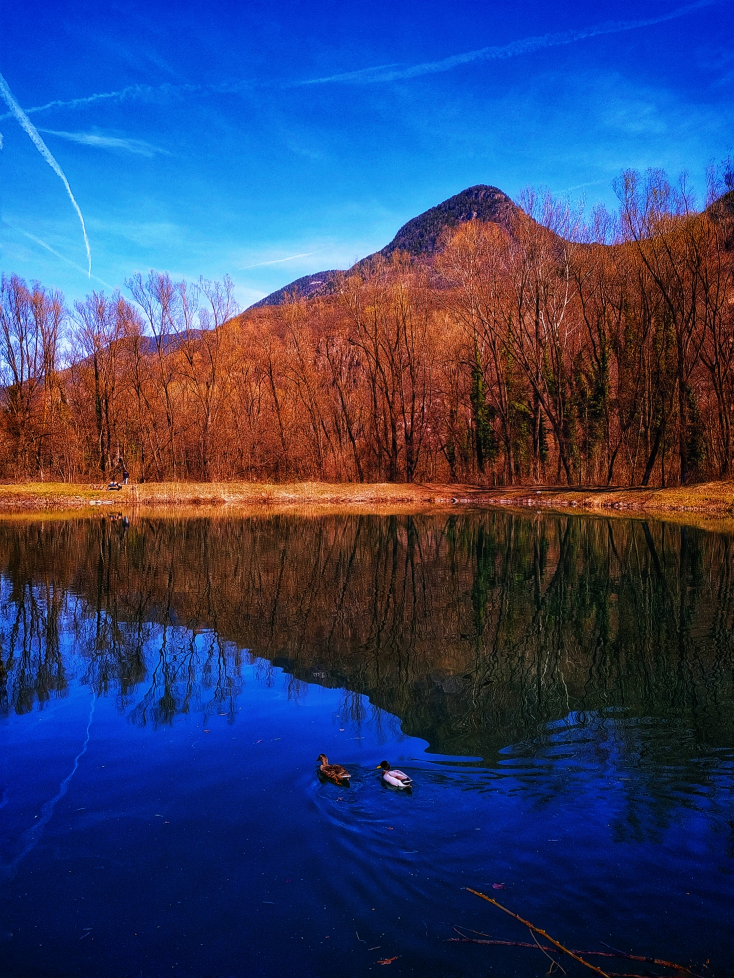 Biotopo del Valsura, Lana, BZ, Italy. Photo: Giovanni Ussi